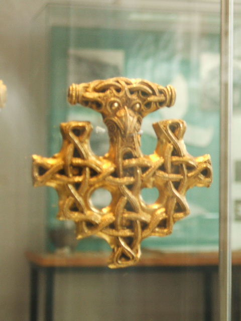 Das Foto zeigt Exponate im Kulturhistorischen Mseum in Stralsund in Stralsund im März 2007.